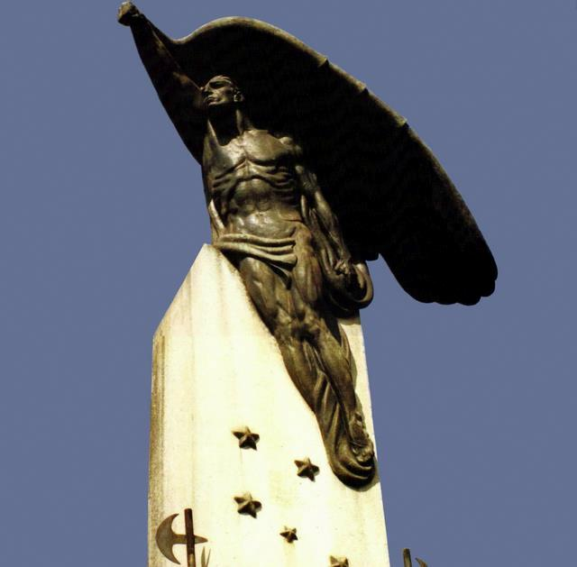 Monumento aos Heróis da Travessia do Atlântico, de Ottone Zorlini (1891-1967), em São Paulo, Brasil - fundo editado (edited background)